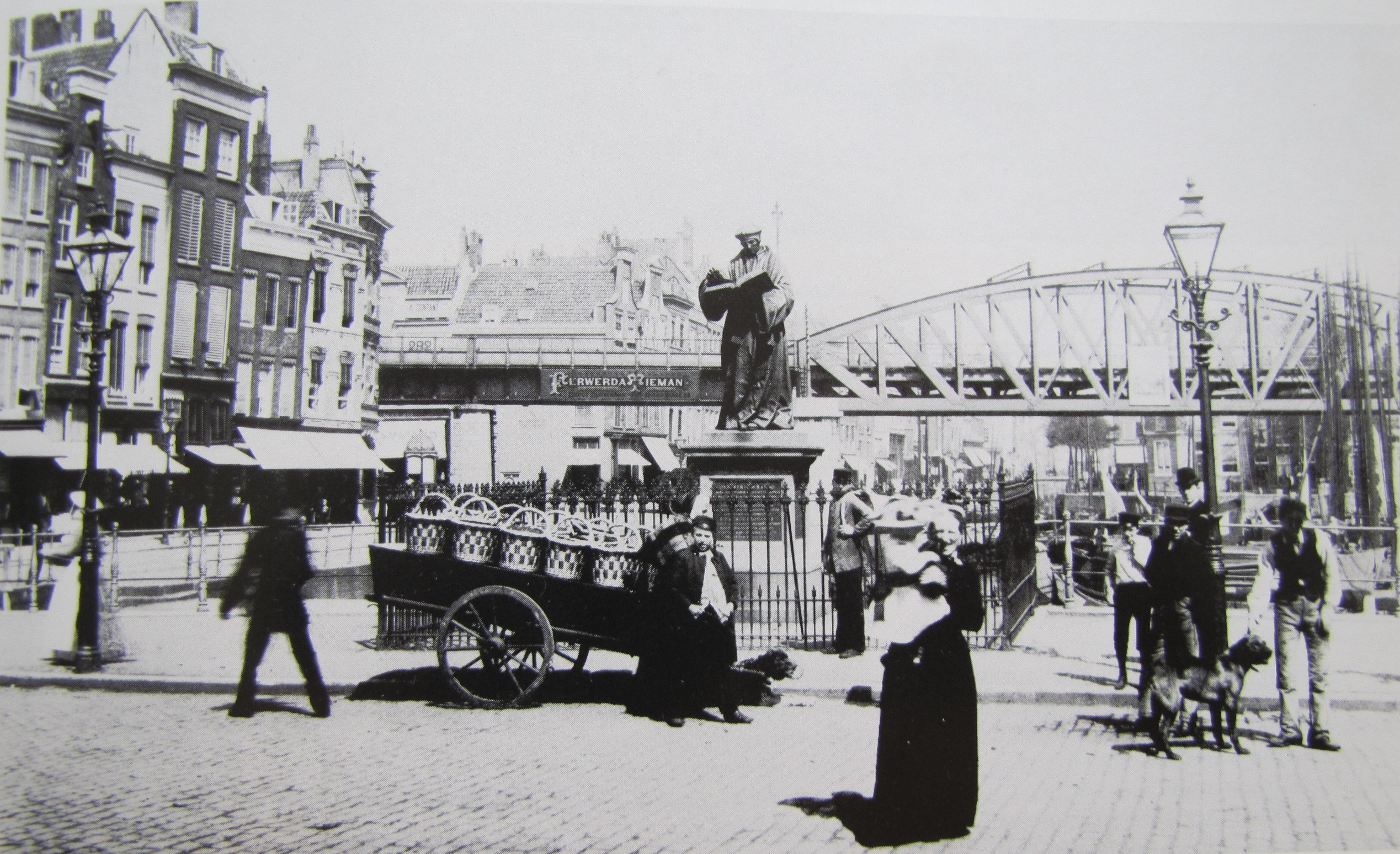 Rotterdam, grand marché (grotemarkt) et statue d'Érasme par H. de Keizer (1622). Photographie, auteur inconnu. 1885. Archives municipales de Rotterdam (GA).